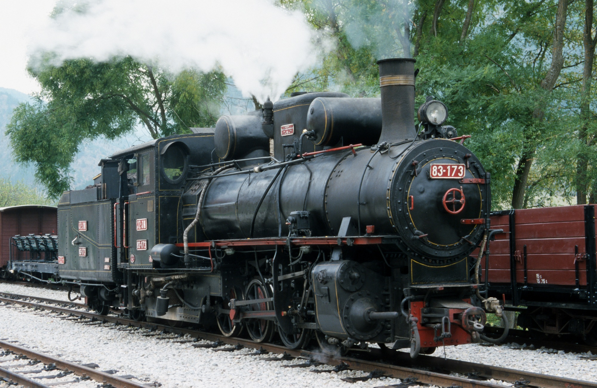 en: Former Yugoslavian States Railway JDŽ 83-173 in Mokra Gora station, on the Šarganska osmica heritage railway in Serbia. de: Jugoslawische Staatsbahnen JDŽ 83-173 im Bahnhof Mokra Gora der Museumsbahn Šarganska osmica in Serbien.